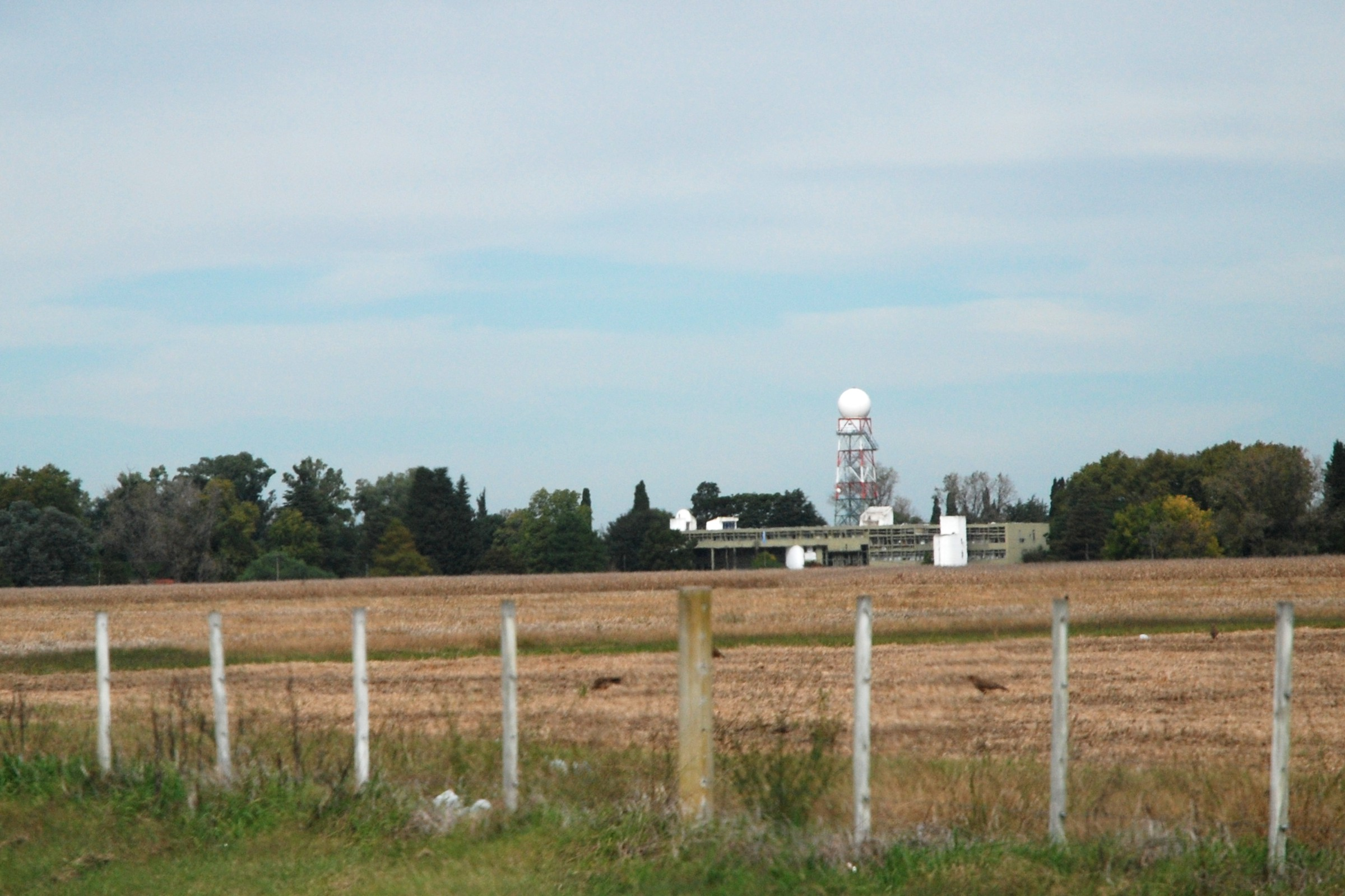 Estación Experimental Agropecuaria, del INTA (Instituto Nacional de Tecnología Agropecuaria) de Pergamino, provincia de Buenos Aires, Argentina.